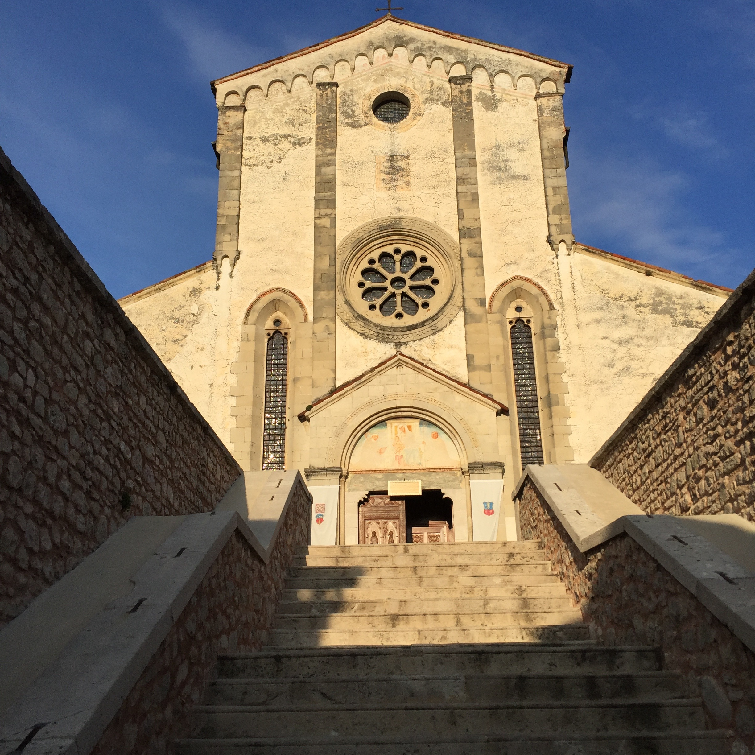 Particolare della scalinata di S. Carlo Borromeo con la facciata della Basilica